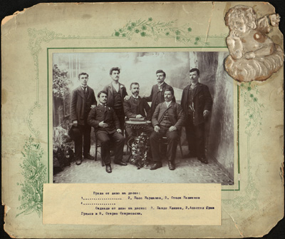 Пандо Каляшев, Апостол Грежов, Стерио Стериовски, Атанас Кършаков, Стасе Новачков